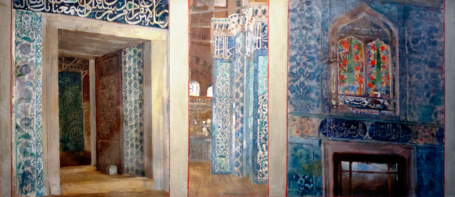 Constantinople, la mosquée Yeni Djami